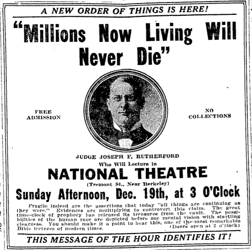 Advertisement, Boston, Massachusetts, USA